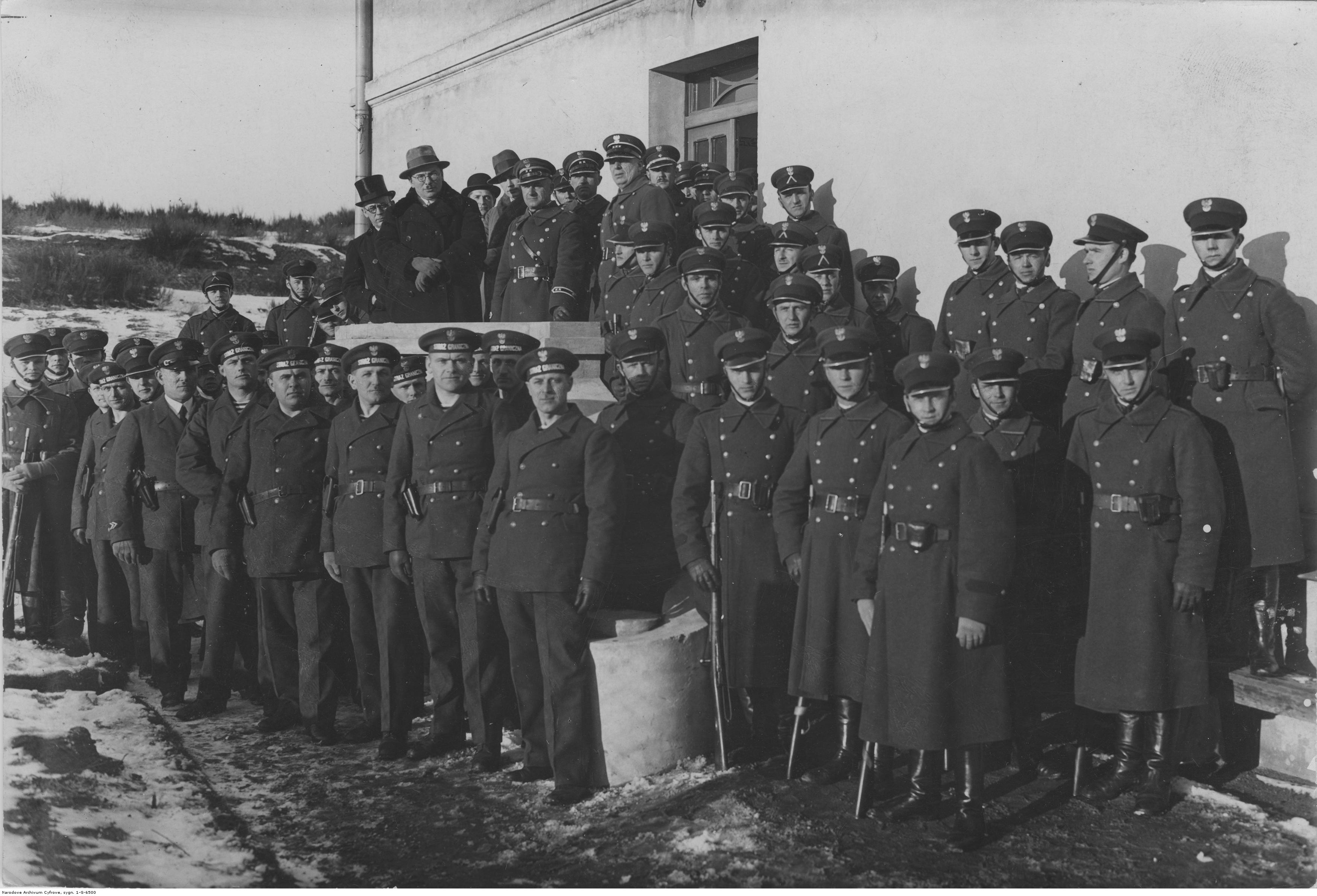 Wizyta wojewody Stefana Kirtiklisa w Straży Granicznej w Gdyni; 1932 r. Koncern Ilustrowany Kurier Codzienny - Archiwum Ilustracji. Sygnatura: 1-G-6500